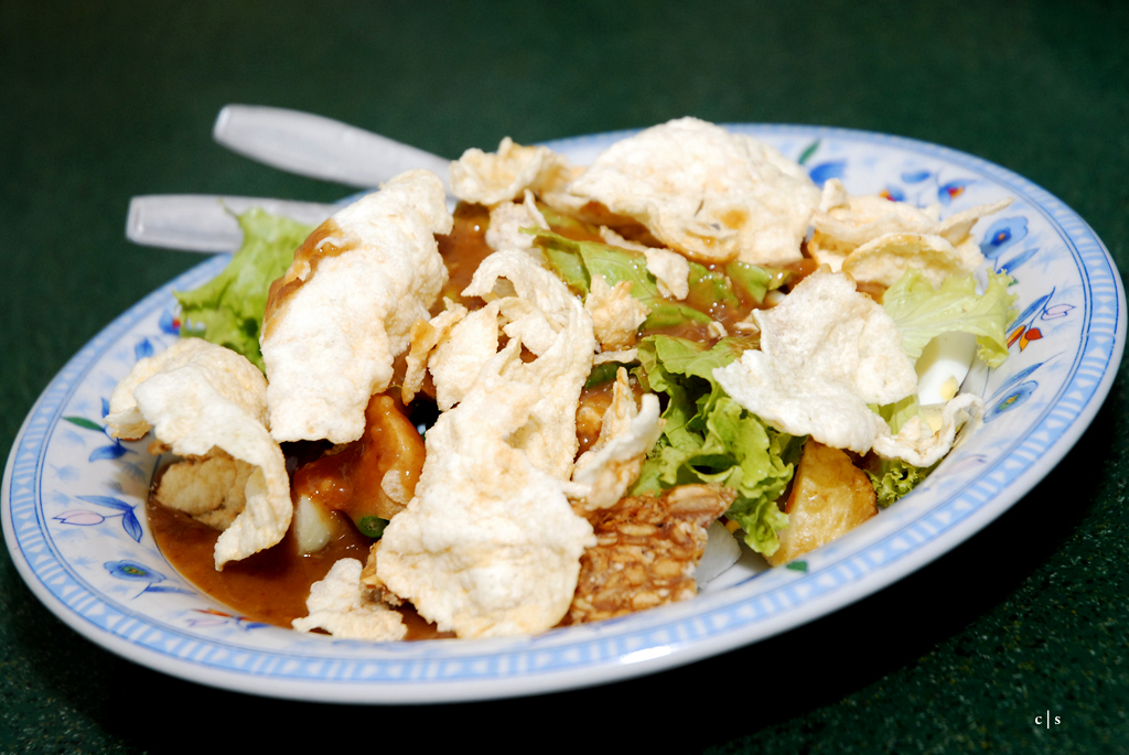 Indonesian cuisine-Gado Gado